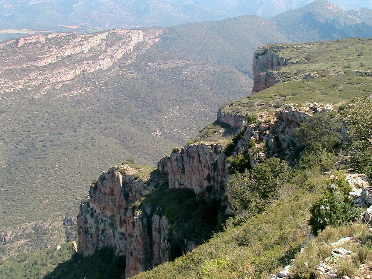 El Mu, a la Serra Carbonera, acaba amb uns elevats cingles sobre la gorja del Segre. Camarasa (Noguera - Catalunya)